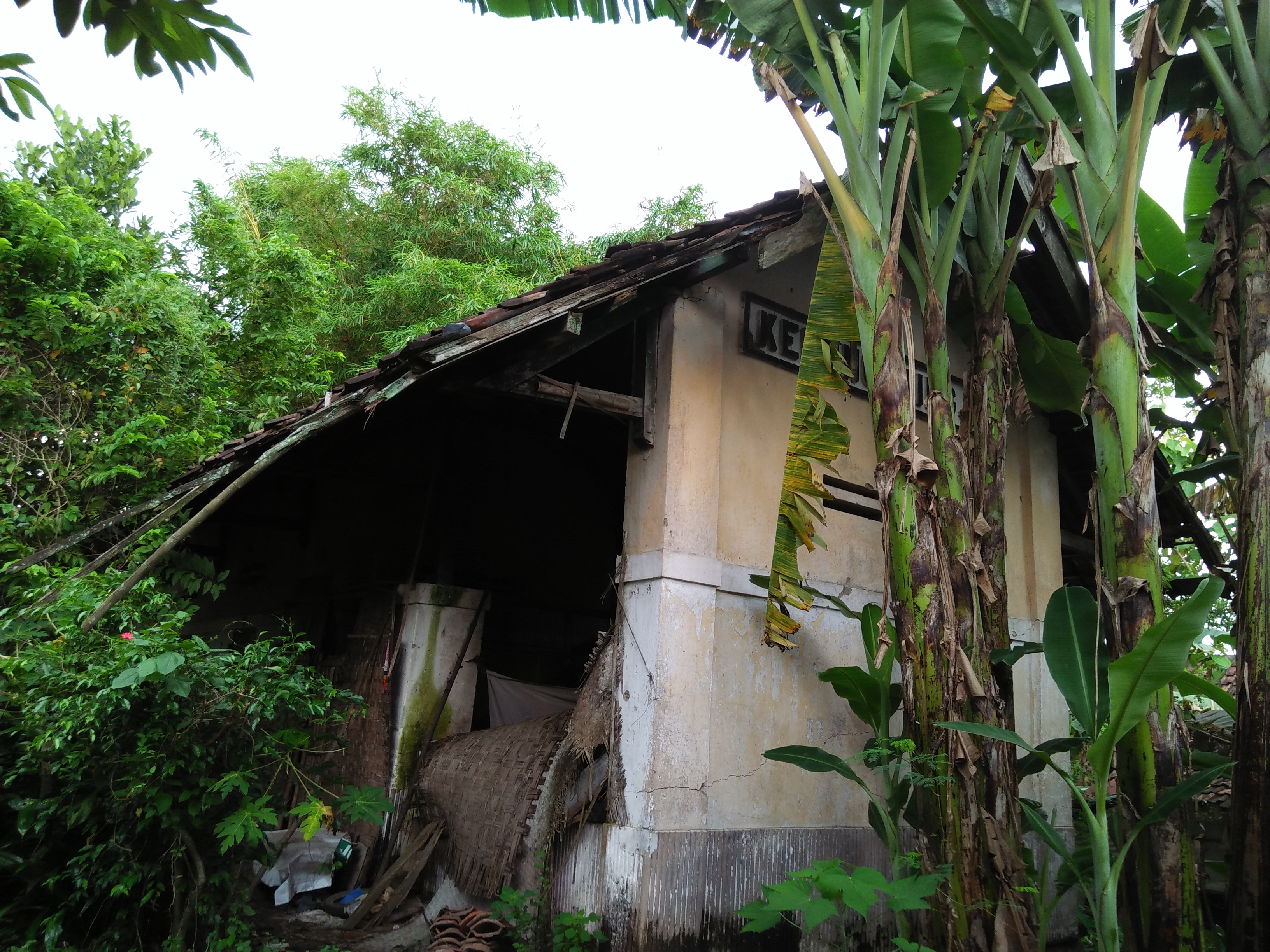 Tampak depan stasiun kedungpring